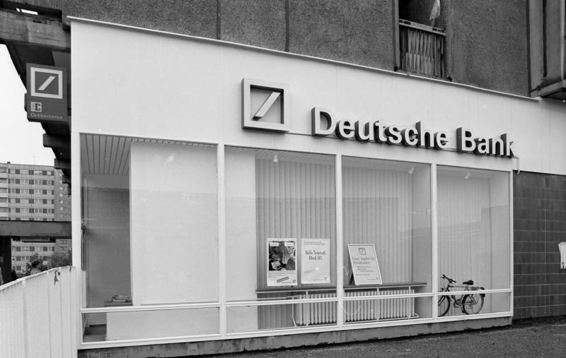 11.-18.8.1991 Bundesland Sachsen-Anhalt Halle-Neustadt Neubaugebiet im Stile des Brutalismus